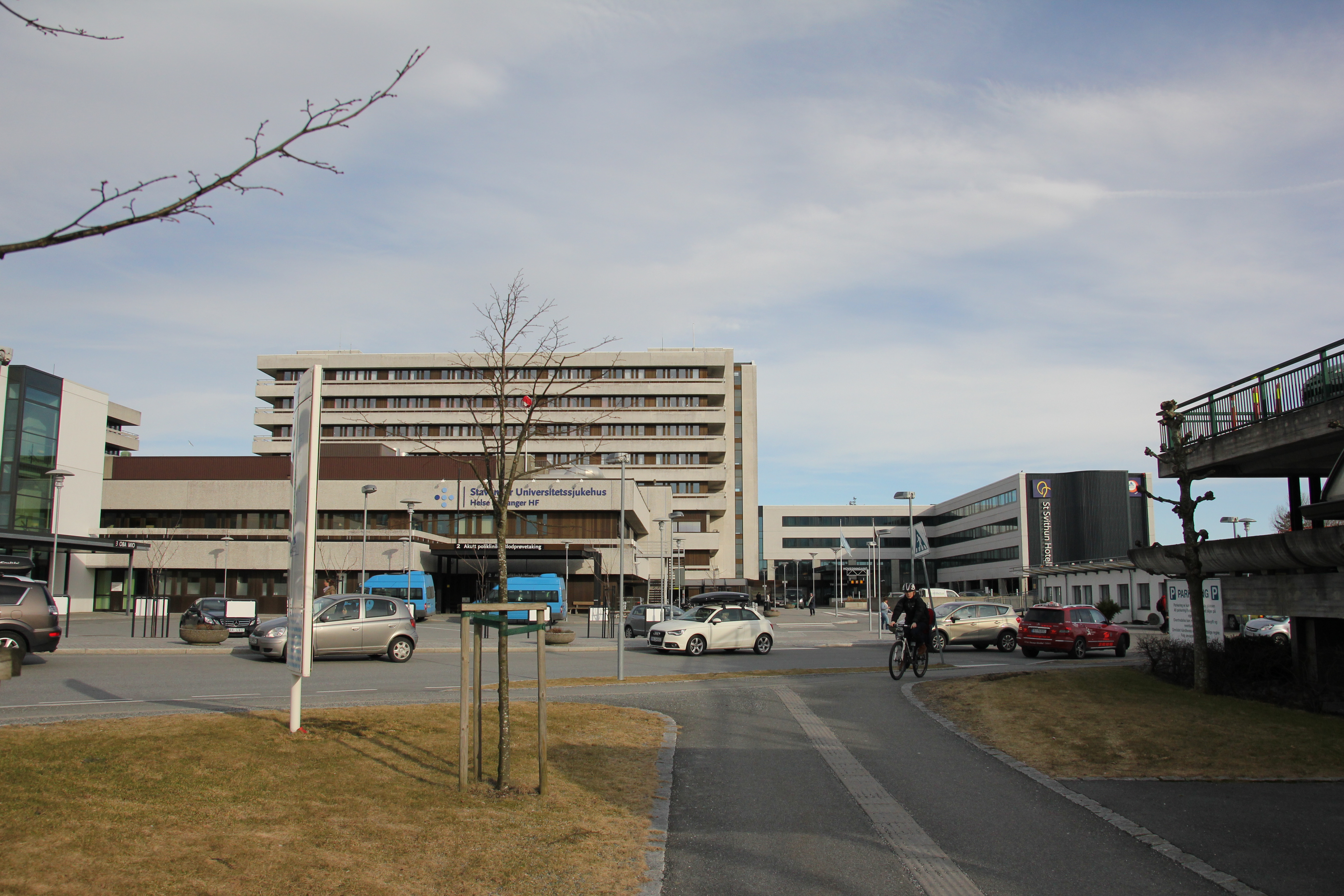 Stavanger University Hospital